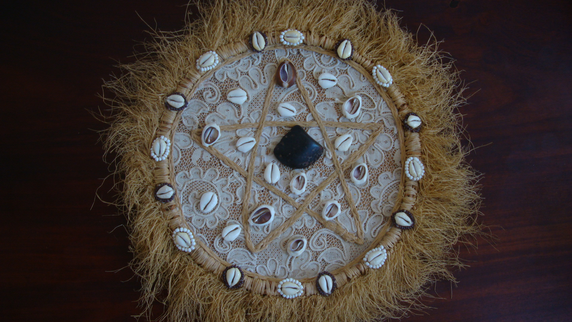 Odu Êjioníle Merindilogun, Salvador, Bahia, Brasil.